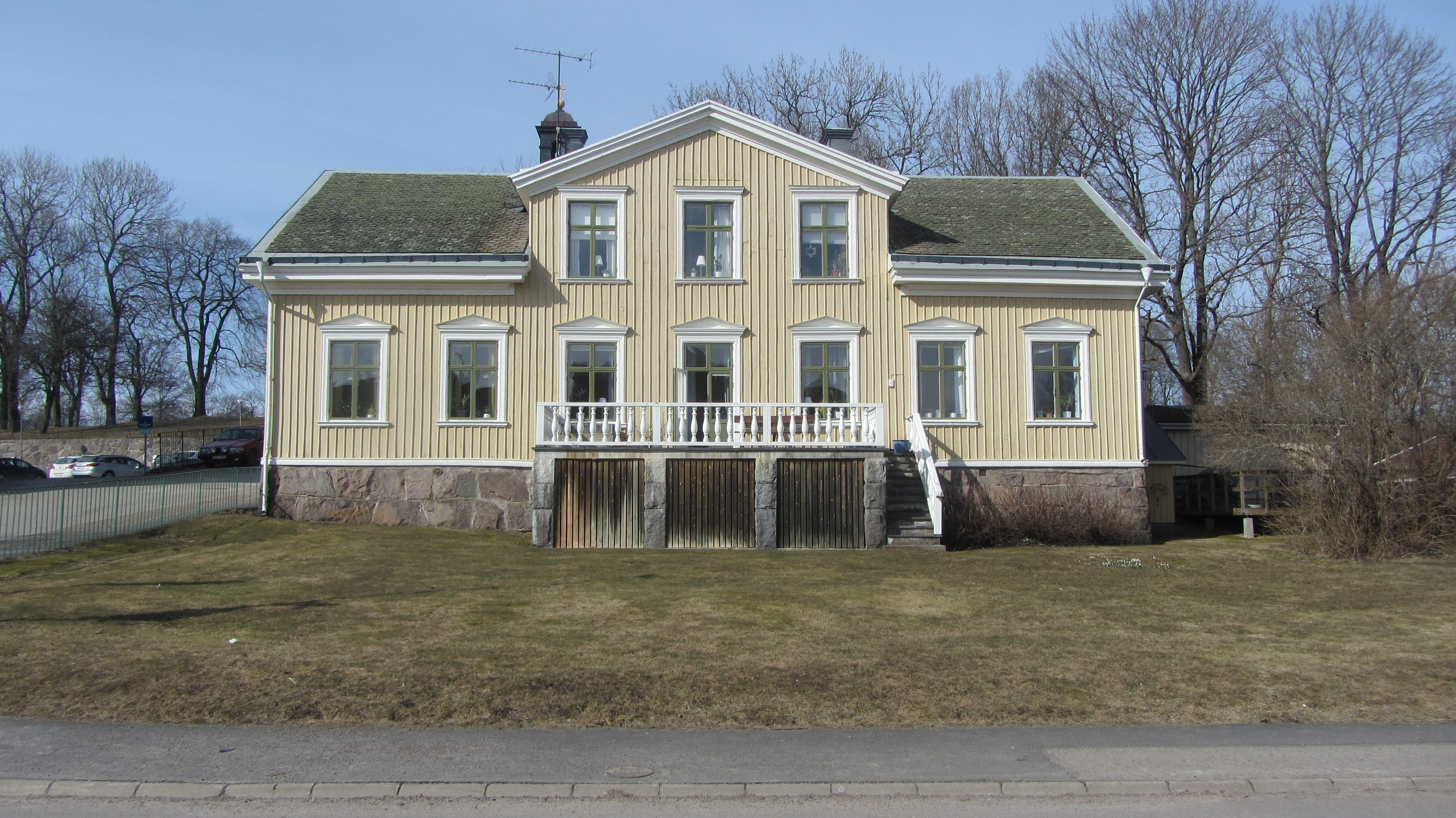 Åmåls gamla skola från 1831 vid Norrtullsgatan, ombyggt till rektorsbostad 1902.